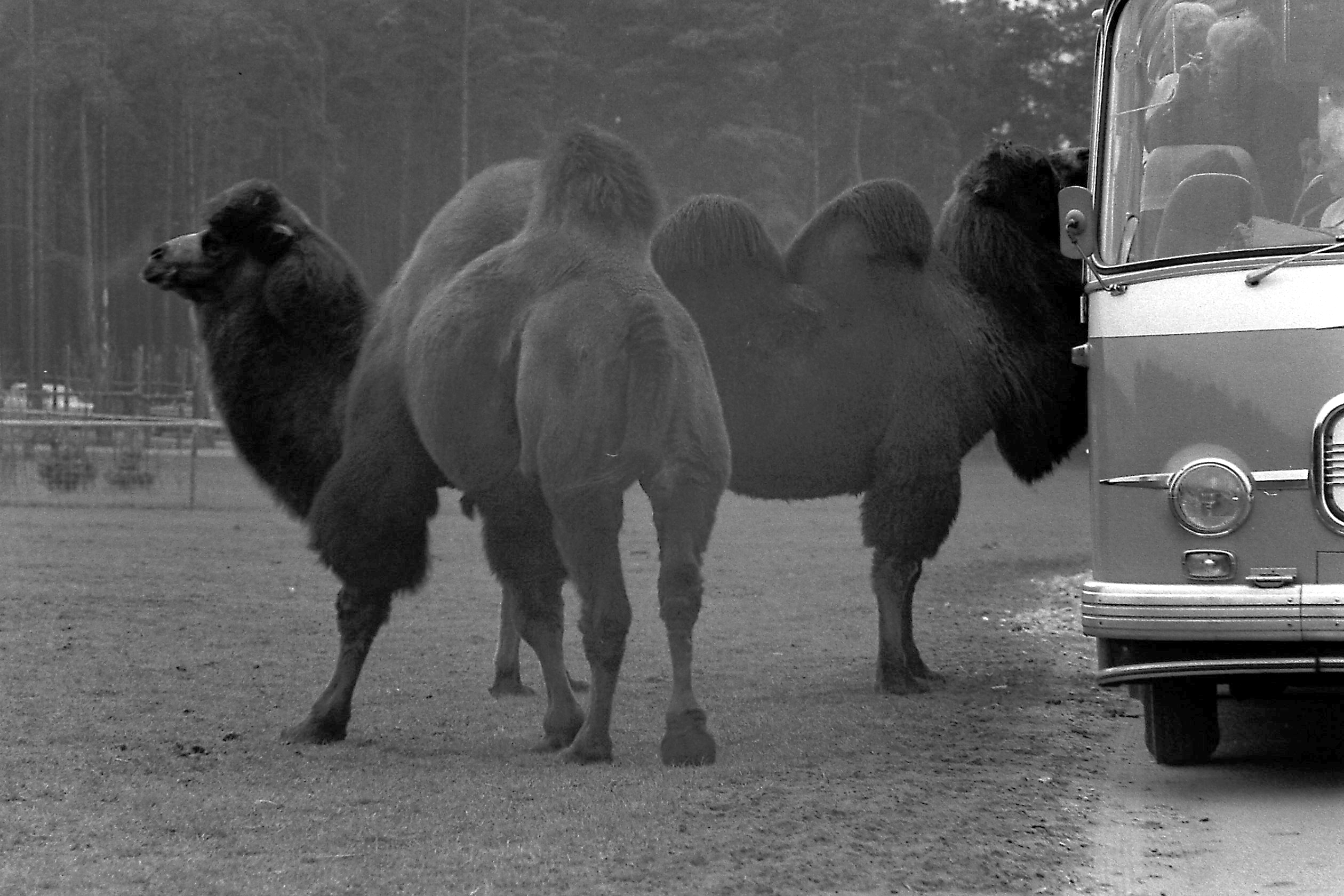 Deutschland (D) - Nordrhein-Westfalen (NW) - Kreis Gütersloh (GT) - Schloß Holte-Stukenbrock: Trampeltiere im Safaripark Stukenbrock